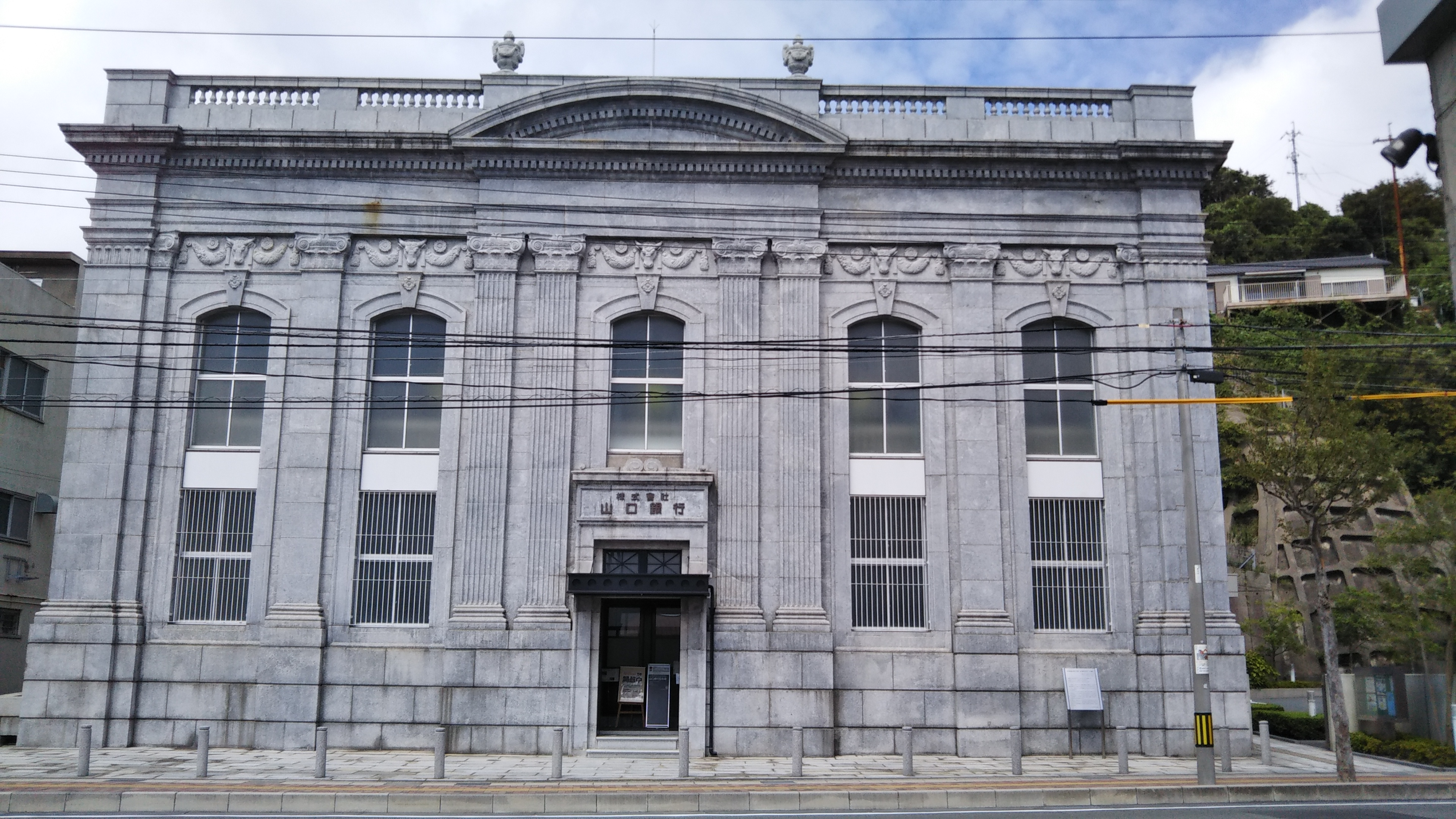 1965年まで山口銀行の本店だった建物(現在は資料館)。2019年9月8日に観音崎町で撮影。